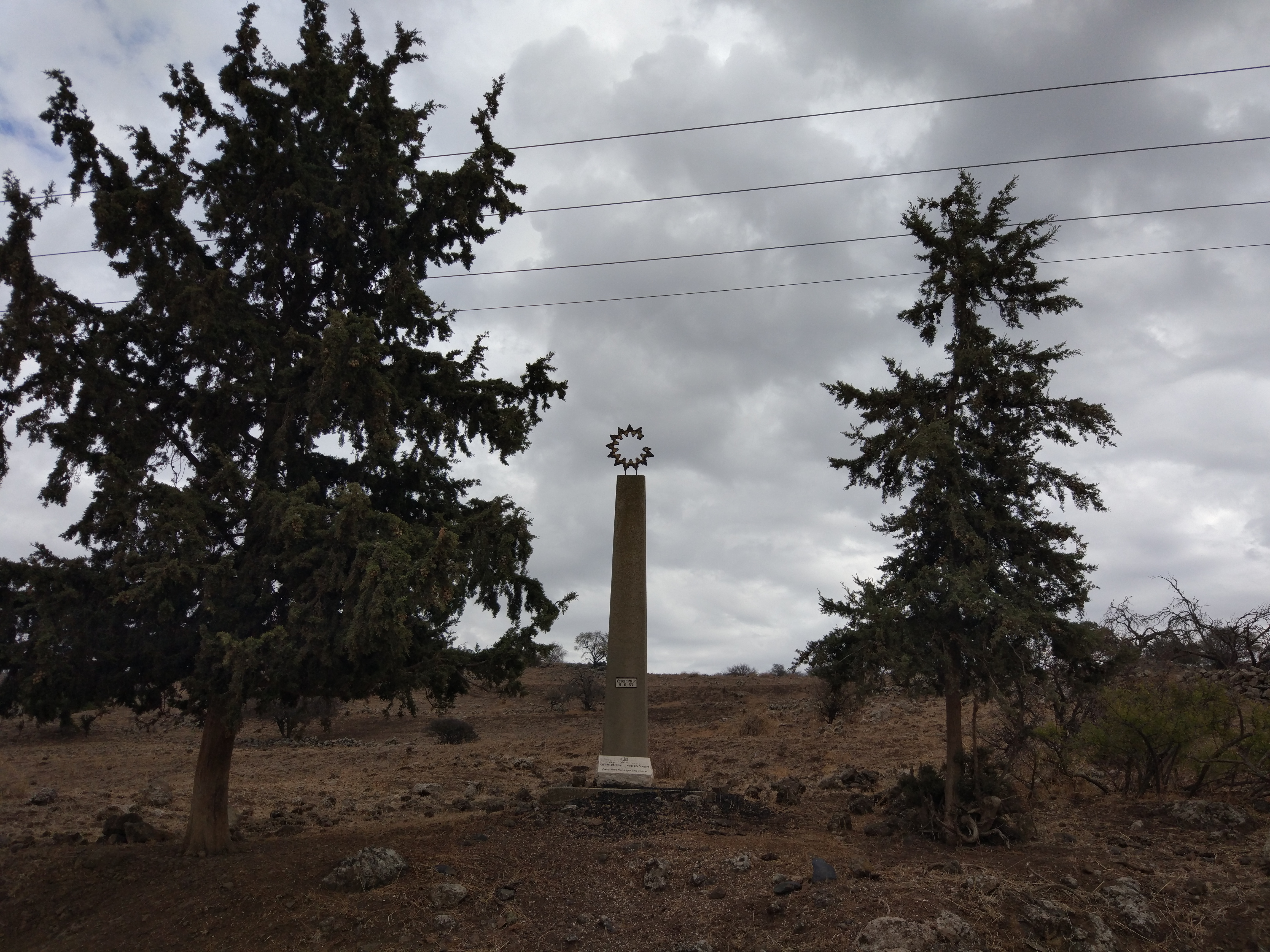 אנדרטה לזכר רפי מוקדי ויובל בן ארצי מחטיבה 8. על ציר הנפט בסמוך לכפר הסורי הנטוש סיר א-דיב.